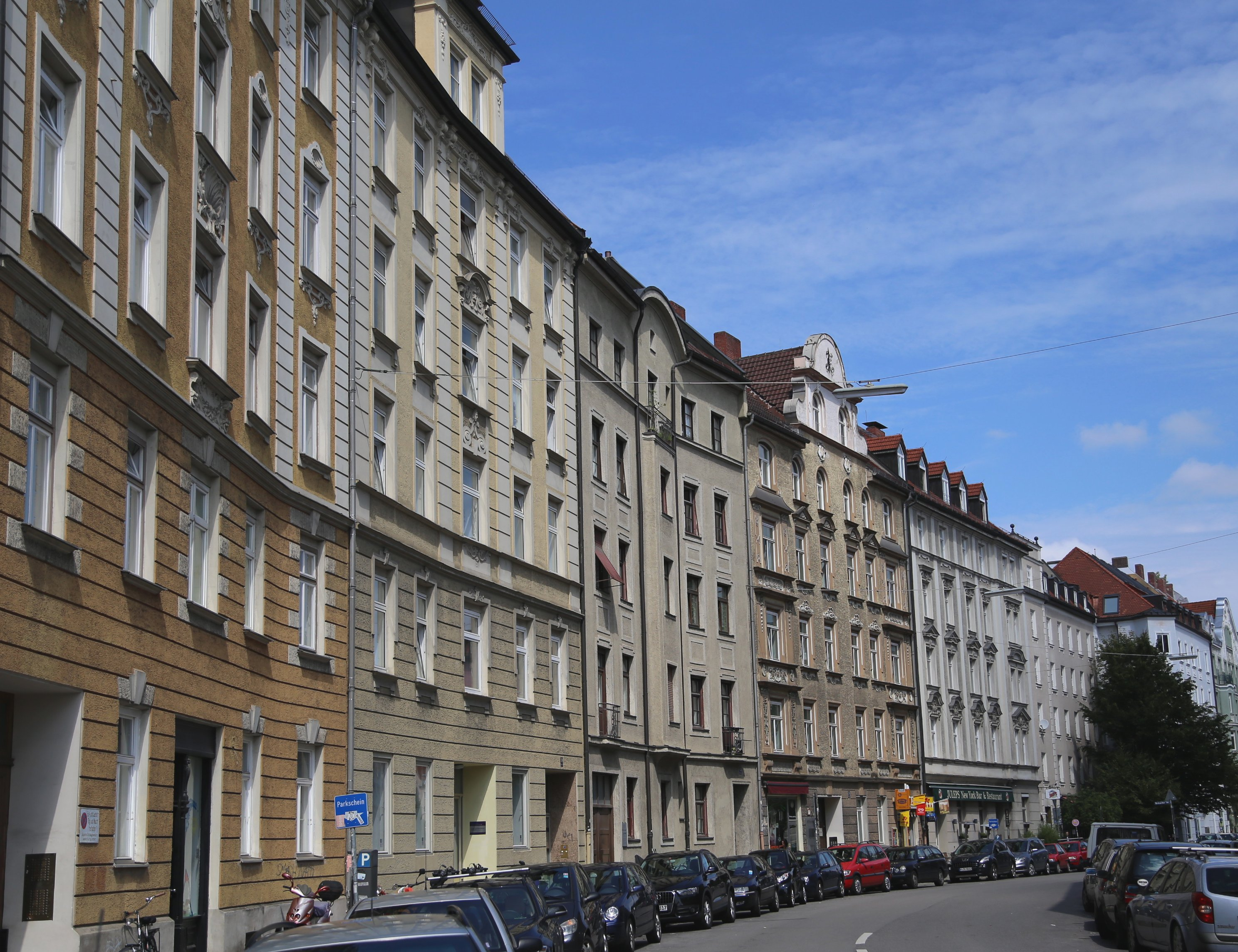 Elsässer Straße in München